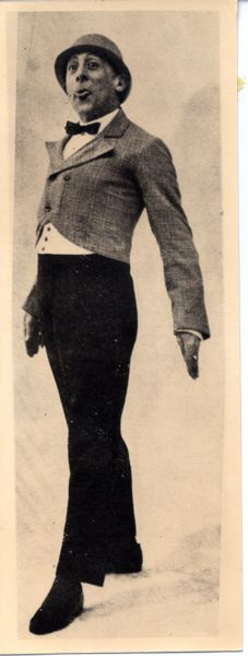 L'attore napoletano Gustavo De Marco, maestro di Totò